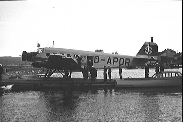 Lufthansa D-APOR Junkers Ju 52 at Gressholmen in Oslo